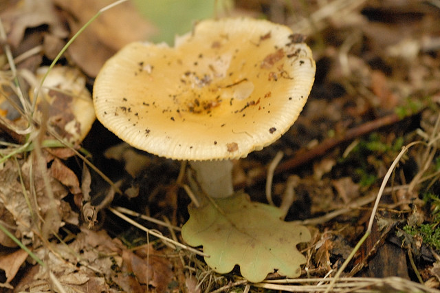 Russula raoultii from Commanster, Belgium.